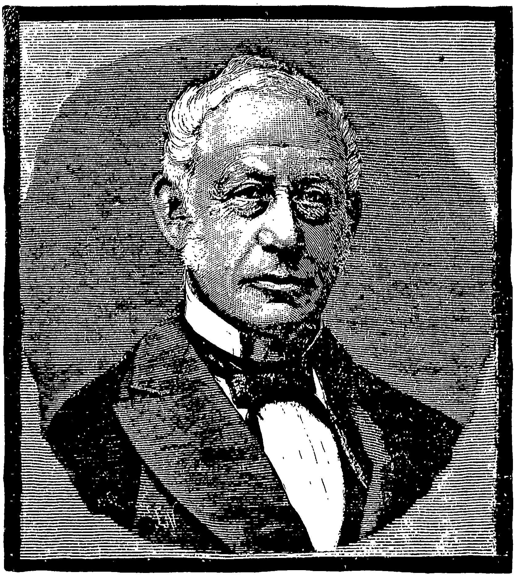 Den norske politikeren Frederik Stang.